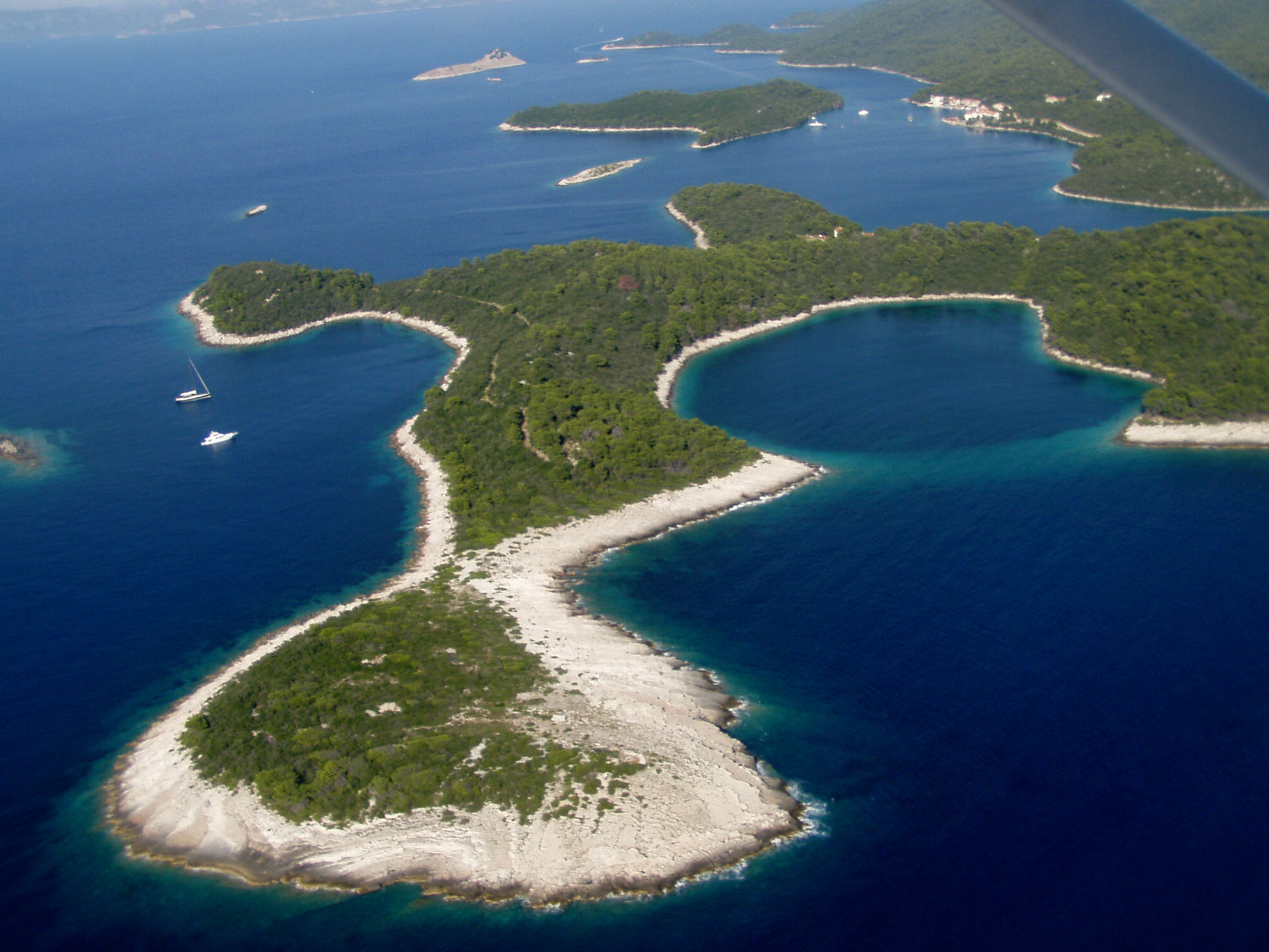 Goli rat, najzapadnija točka otoka Mljeta